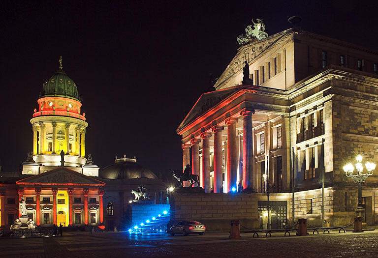 Der Gendarmenmarkt in Berlin mit Deutschem Dom und Konzerthaus beim Festival of Lights 2007